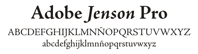 Imagen de la tipografía Jenson